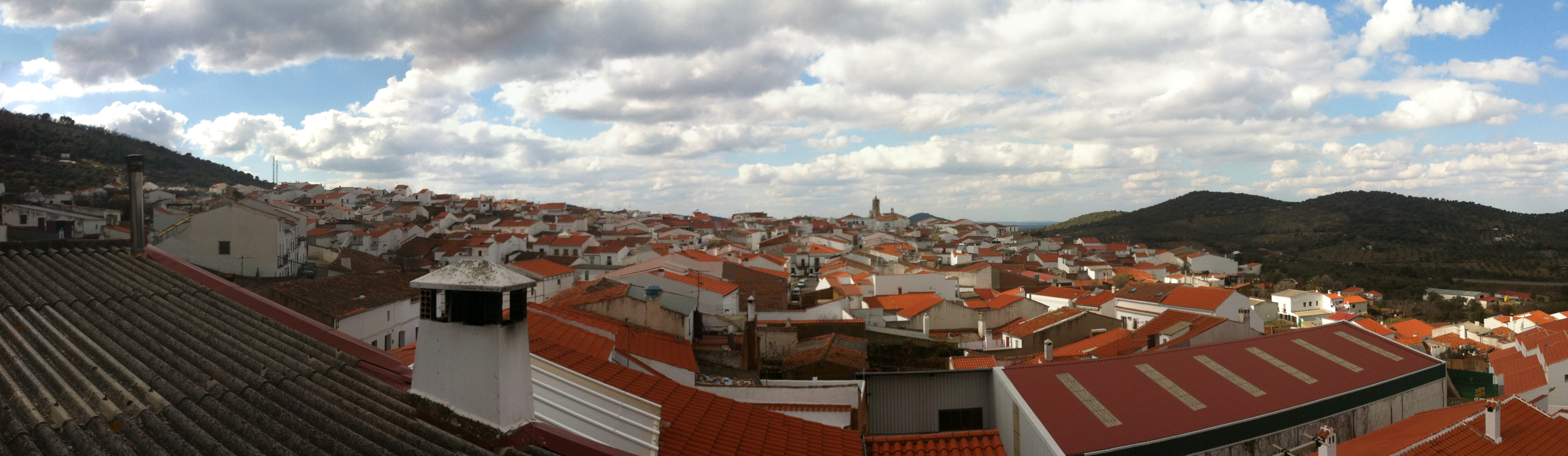 Panorámica de Cabeza la Vaca desde uno de sus extremos